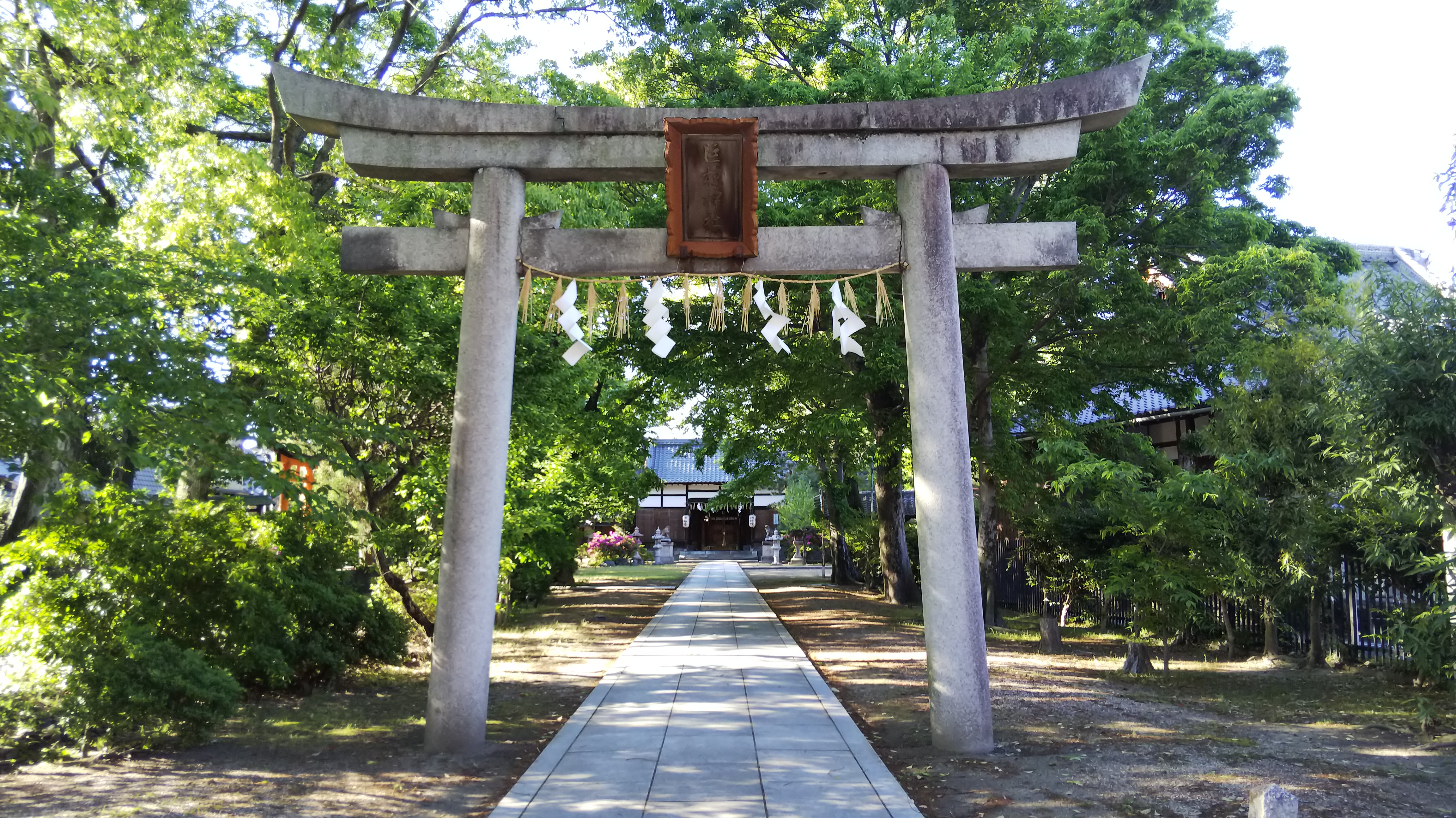 巨椋神社鳥居